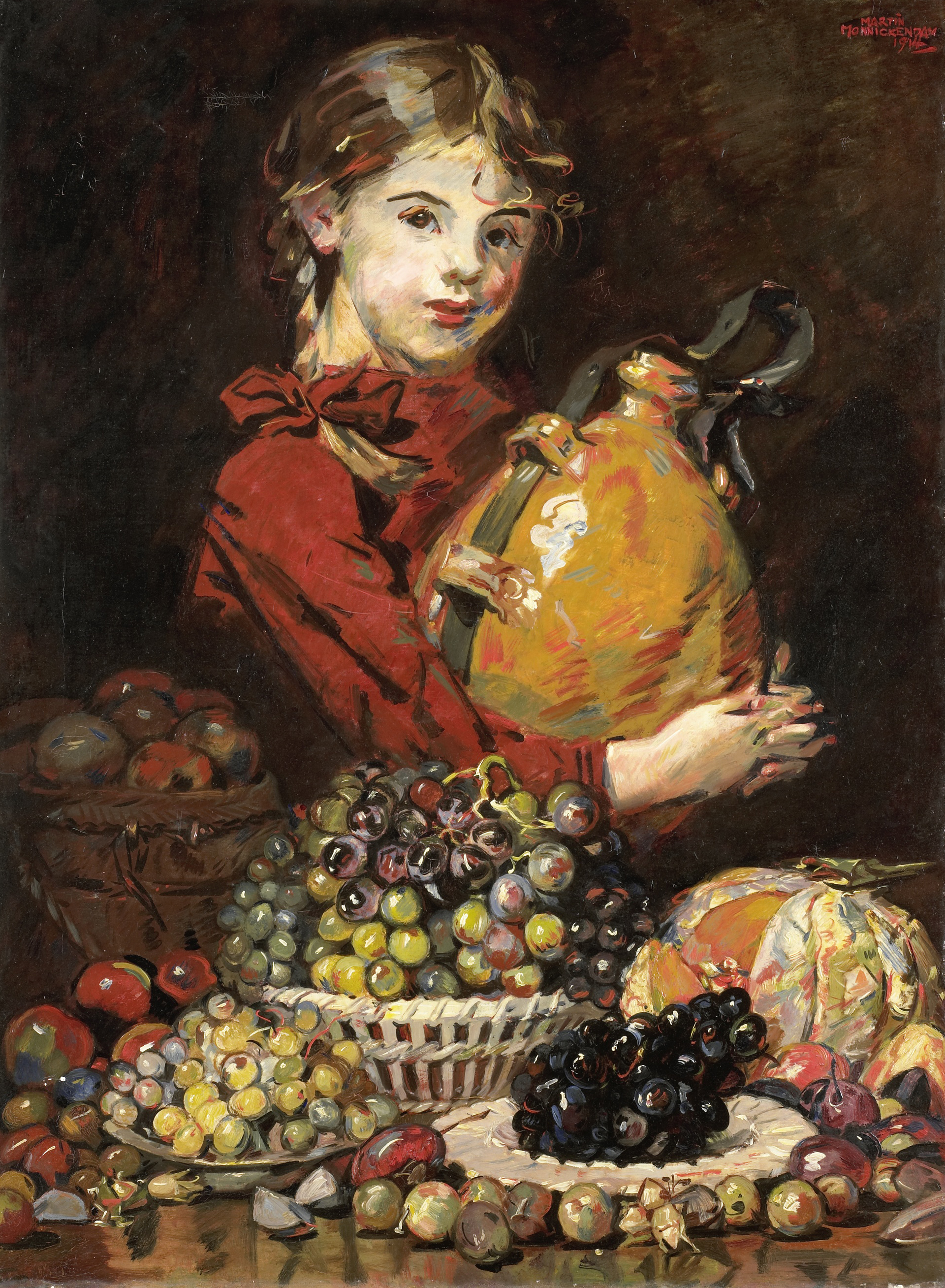 Monarosa, dochter van de schilder, als fruitverkoopster. Het meisje staat achter een tafel waarop druiven, een meloen en ander fruit ligt uitgestald. In de armen een aardewerken kruik.